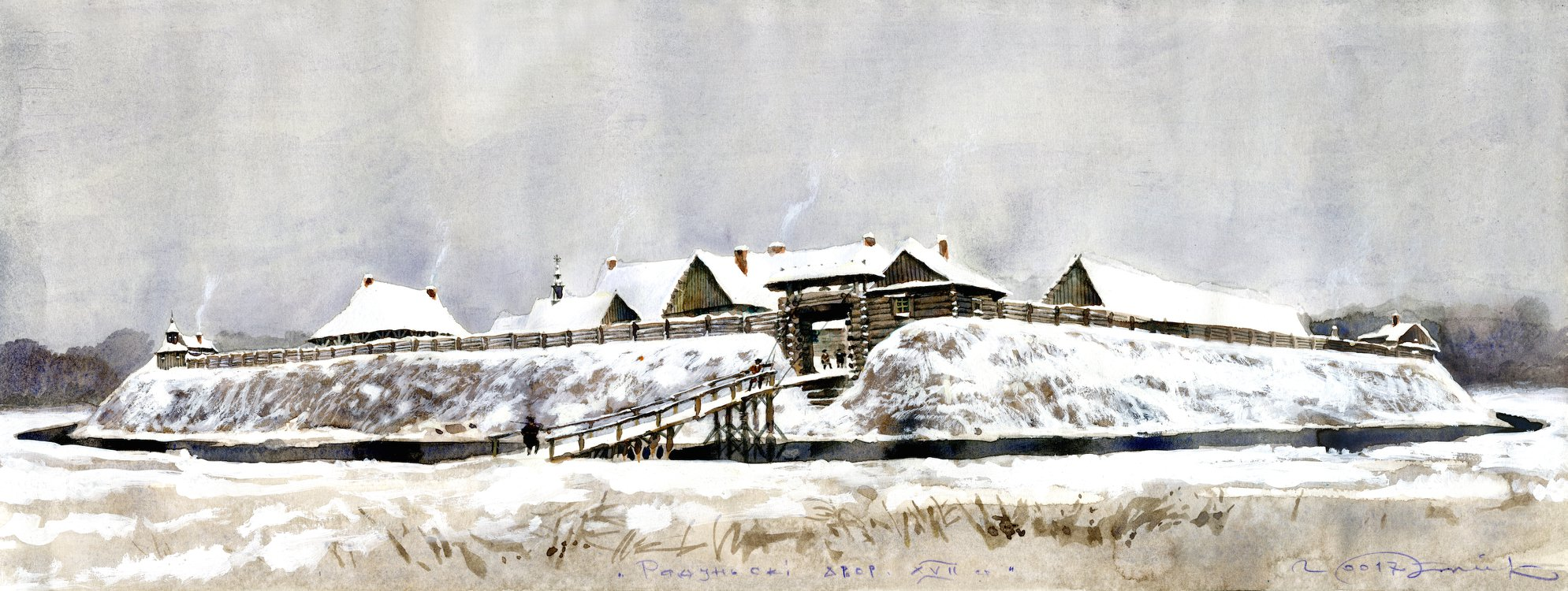 Умацаваны Гаспадарскі двор (двор старасты Радуньскага староства, вялікакняская маёмасць) ў Радуні (сяр. 17-га ст.)